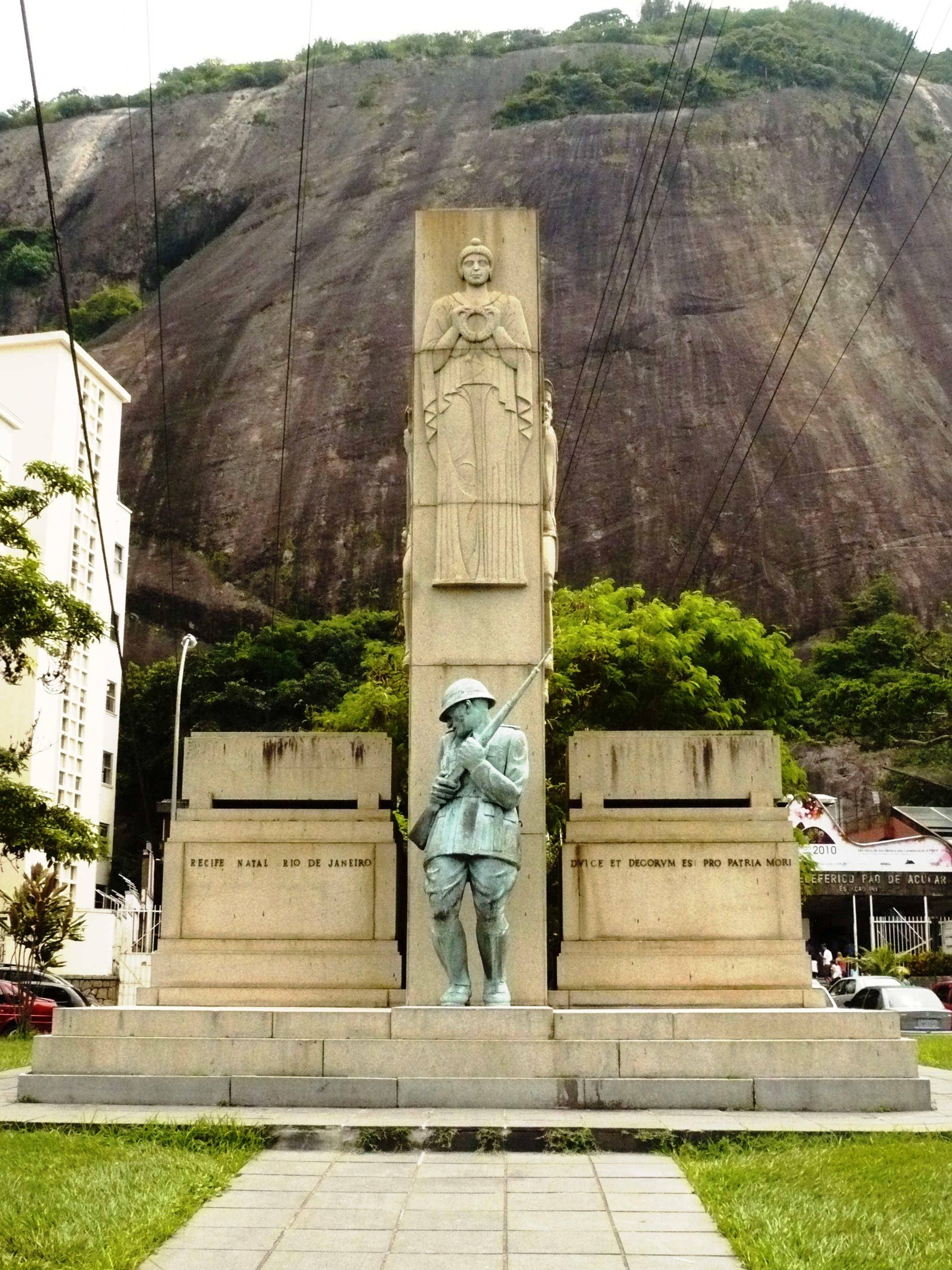 Monumento aos Soldados Mortos na Intentona Comunista de 1935, Urca, Rio de Janeiro, RJ, Brasil.